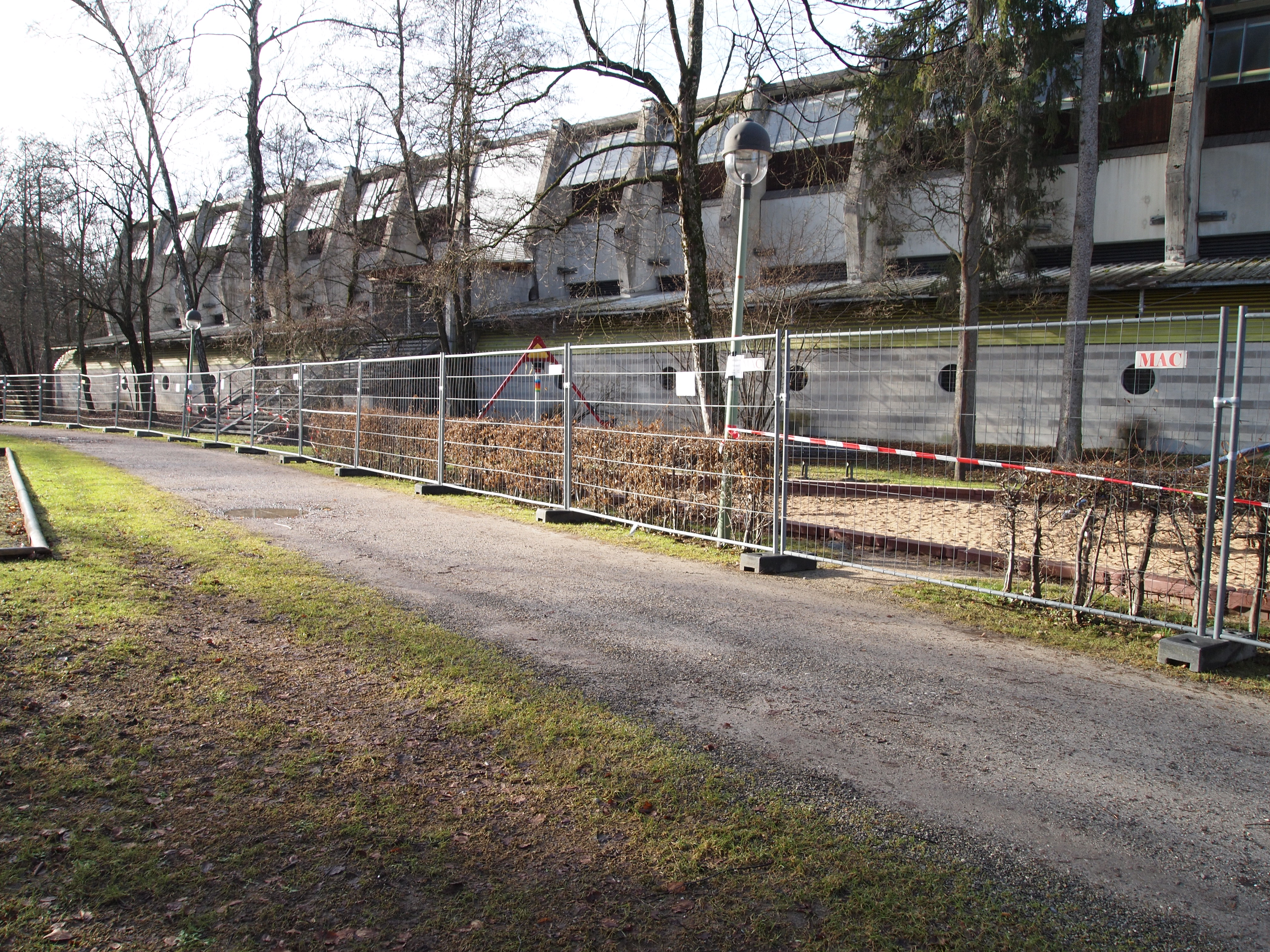 Jordanpark, Gesperrter Spielplatz in unmittelbarer Nähe der Sparkassenarena Kaufbeuren